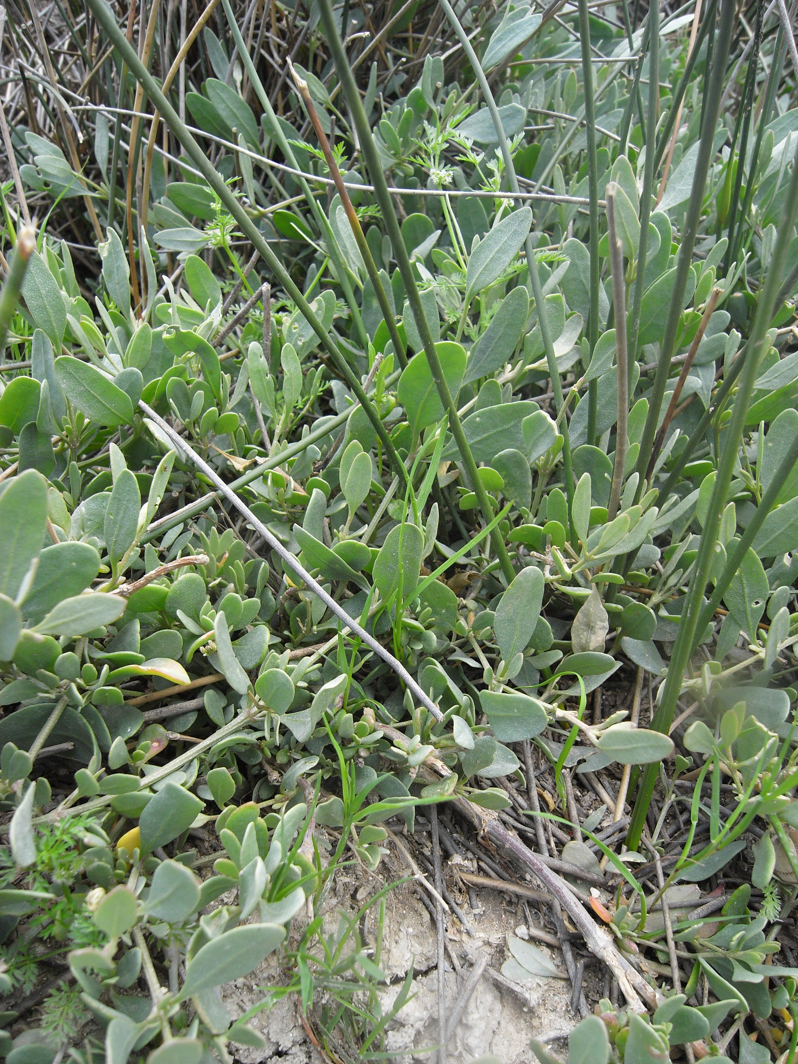 Atriplex halimus, Sousse, Tunesien, April